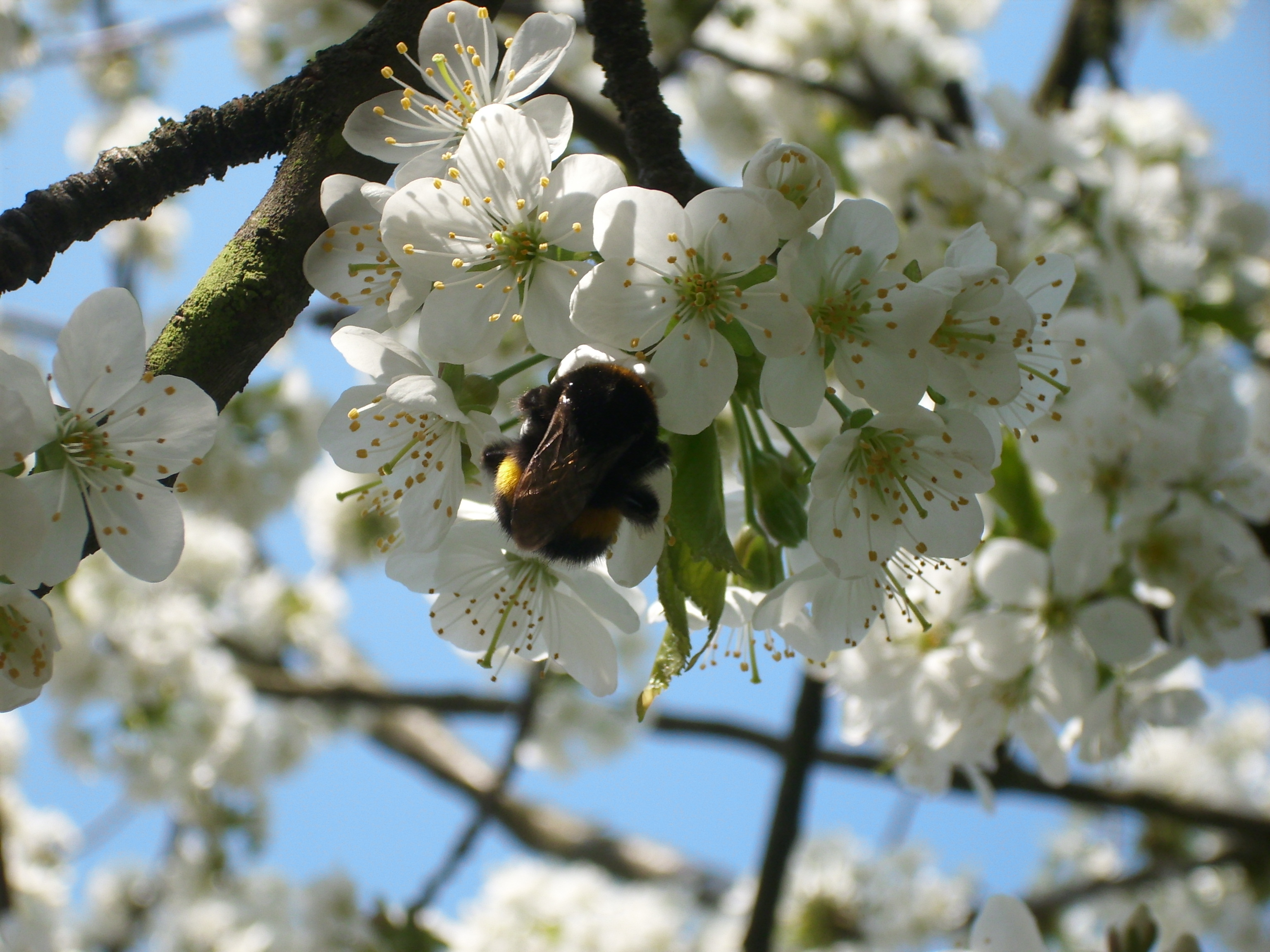 Eine Hummel (Bombus terrestris) saugt Nektar an einer Kirschblüte (Prunus avium) im heimischen Northeimer Garten.